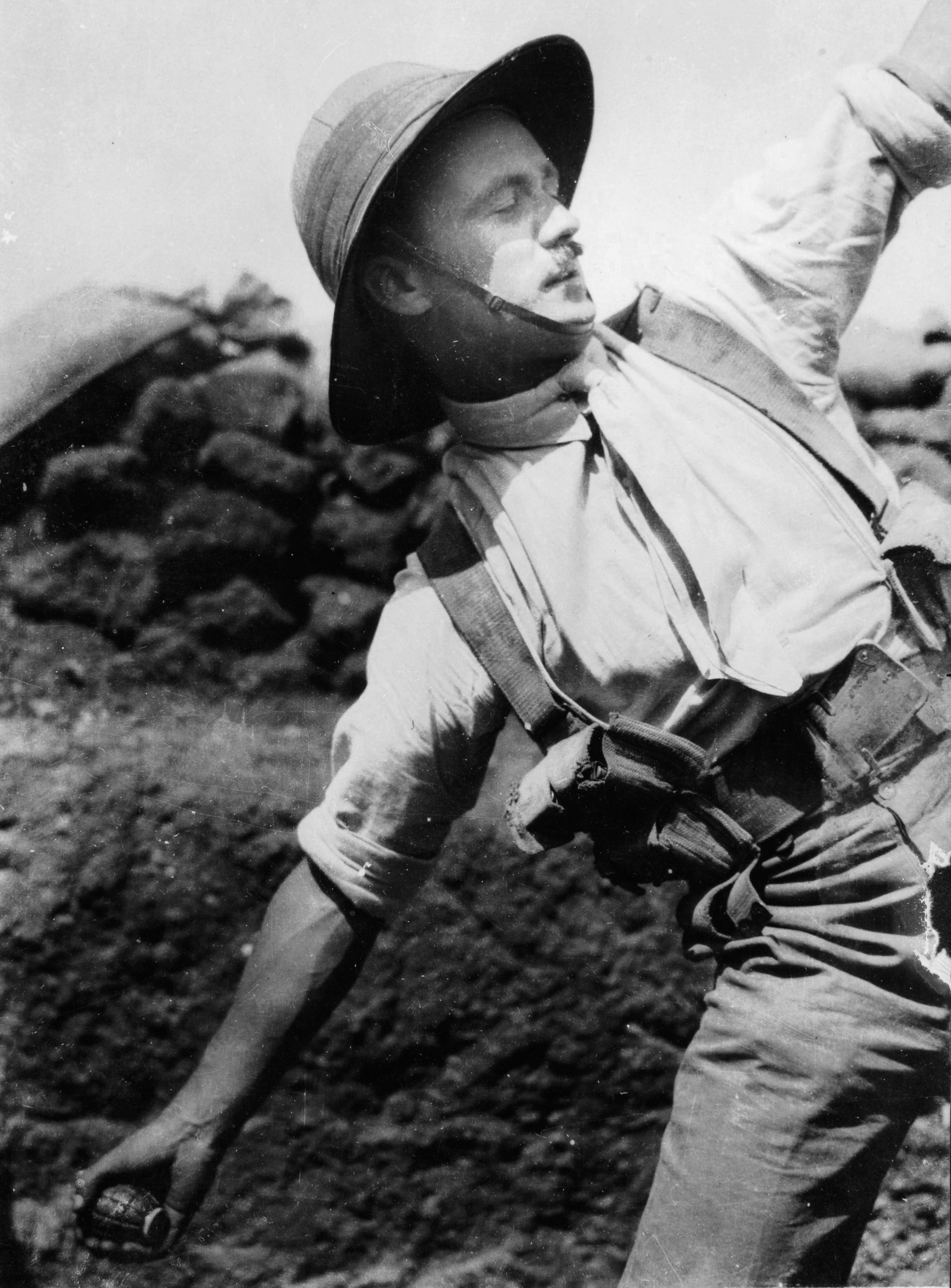 Collectie / Archief : Fotocollectie Eerste Wereldoorlog Reportage / Serie : The British forces at Salonika Beschrijving : A bombing officer "lobbing" a Mills grenade Annotatie : De Britse stijdkrachten te Saloniki. Britse officier werpt een Mills handgranaat Datum : {1914-1918} Locatie : Griekenland, Saloniki Trefwoorden : eerste wereldoorlog, fronten, handgranaten, officieren Fotograaf : The Press Bureau Auteursrechthebbende : Public Domain logo Materiaalsoort : Foto (zwart/wit) Nummer archiefinventaris : bekijk toegang 2.24.09 Bestanddeelnummer : 158-2200